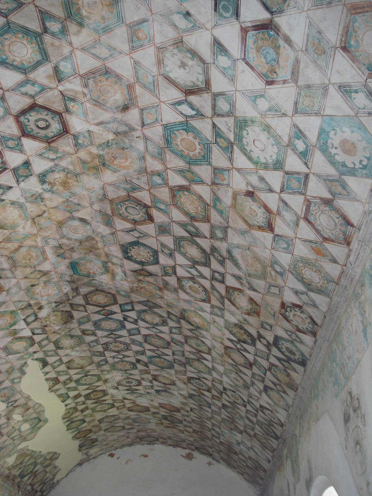 Santo Domingo de German, Oaxtepec, Morelos, Mexico